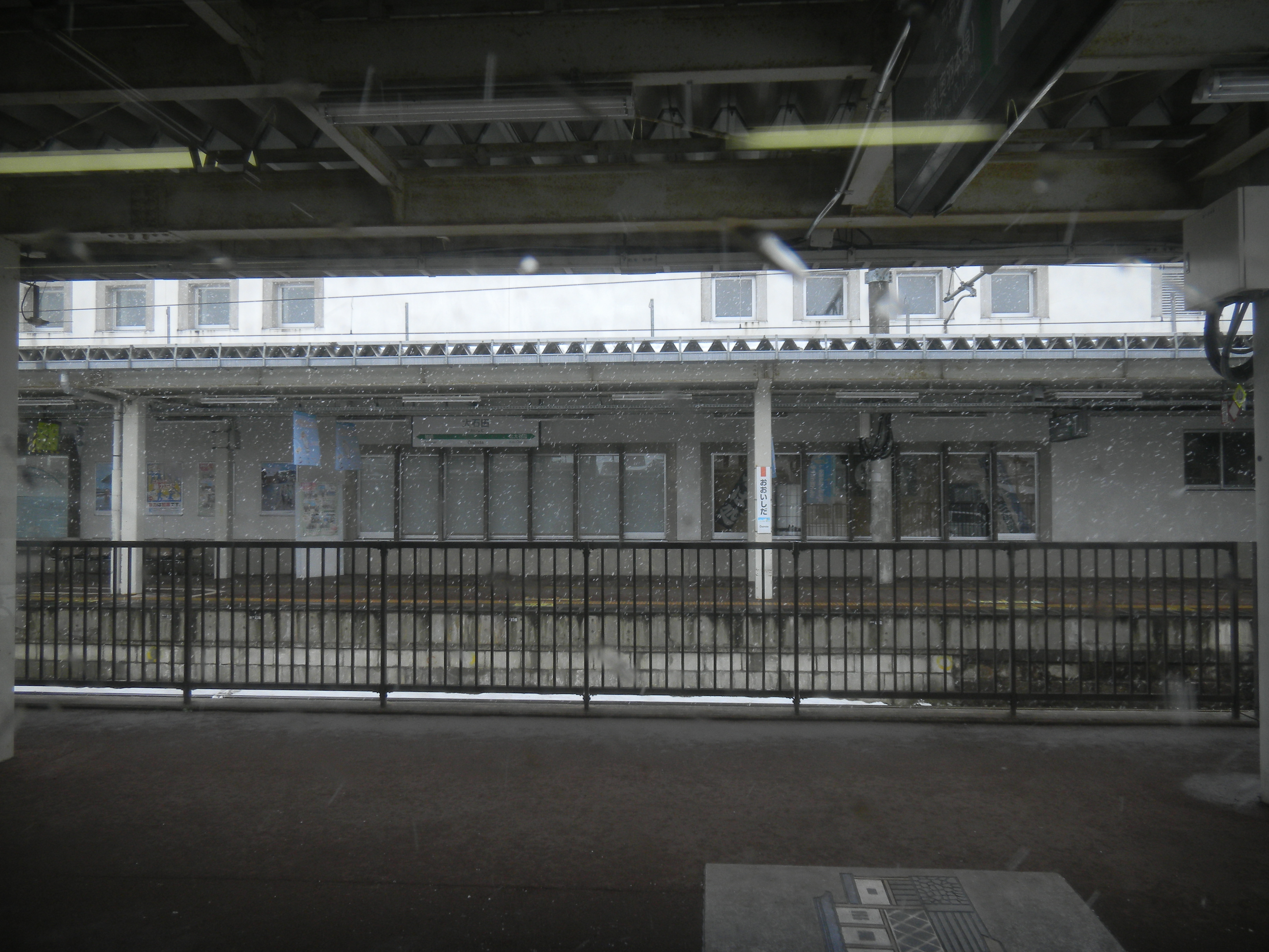 大石田駅構内